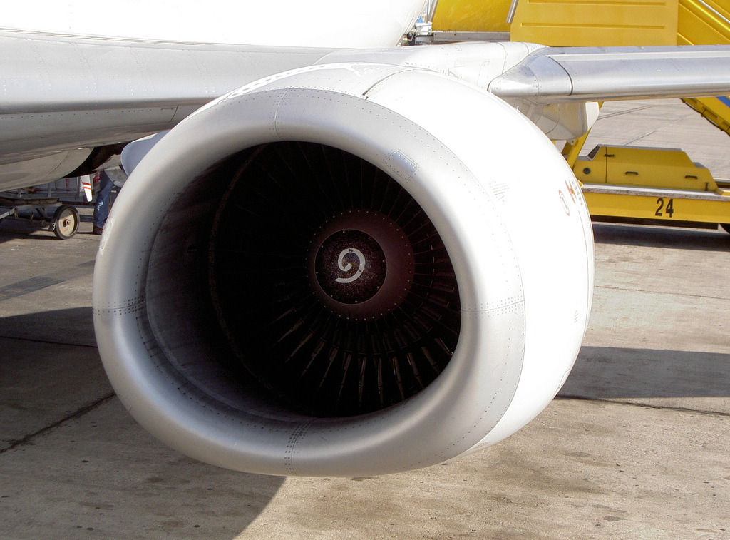 Boeing 737-400 CFM Engine